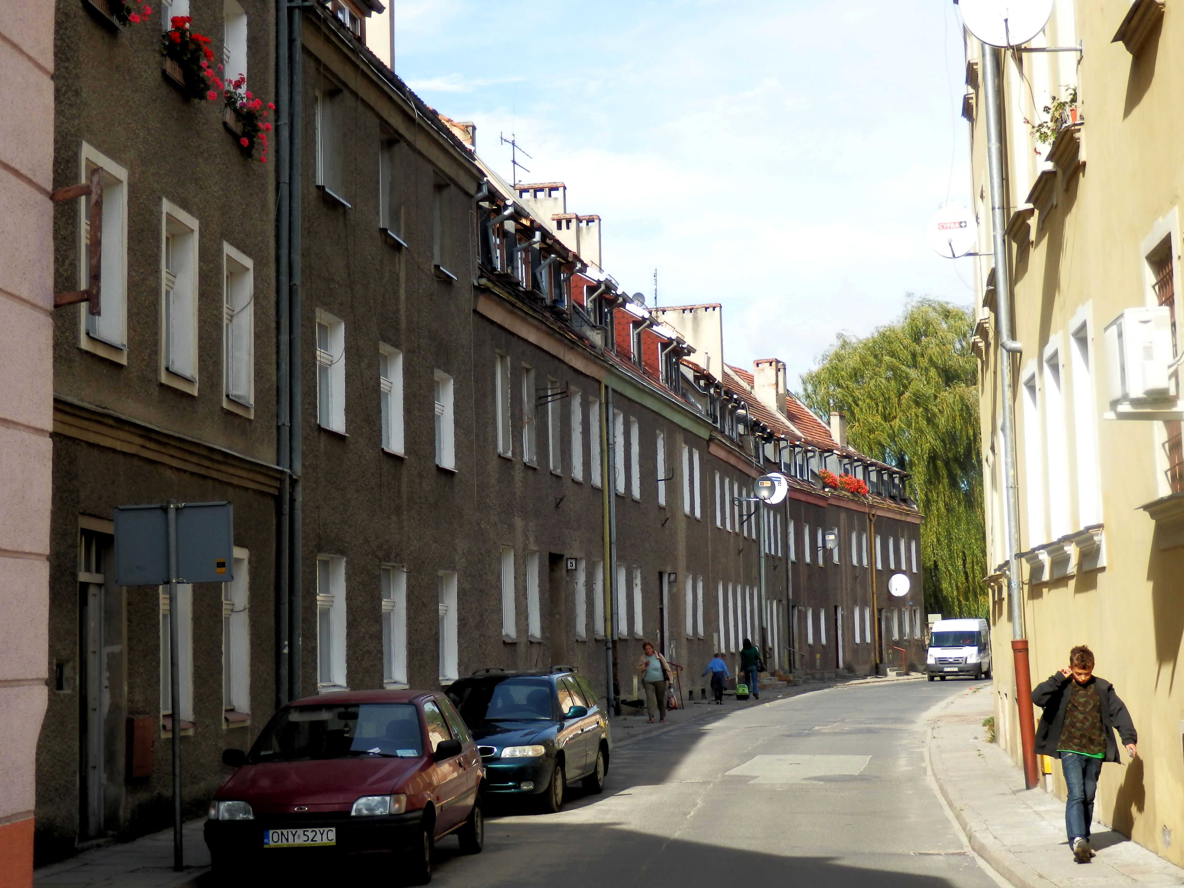 Głuchołazy, ul. Wita Stwosza 5 - dom, XVIII/XIX